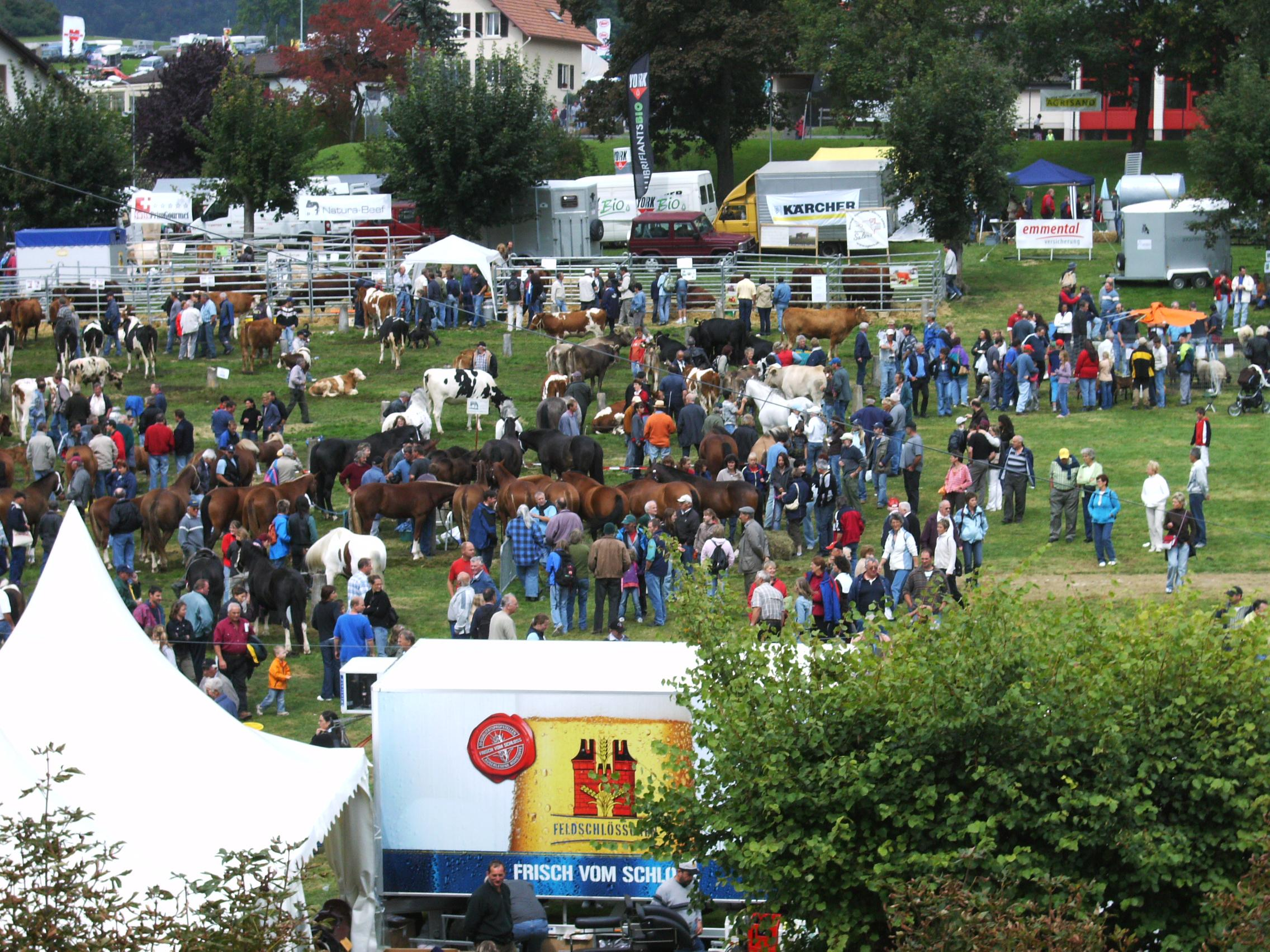 Champ de foire, Foire de Chaindon 2007 à Reconvilier (canton de Berne, Suisse). Prise de la photo : depuis l'école primaire en direction du nord-ouest.